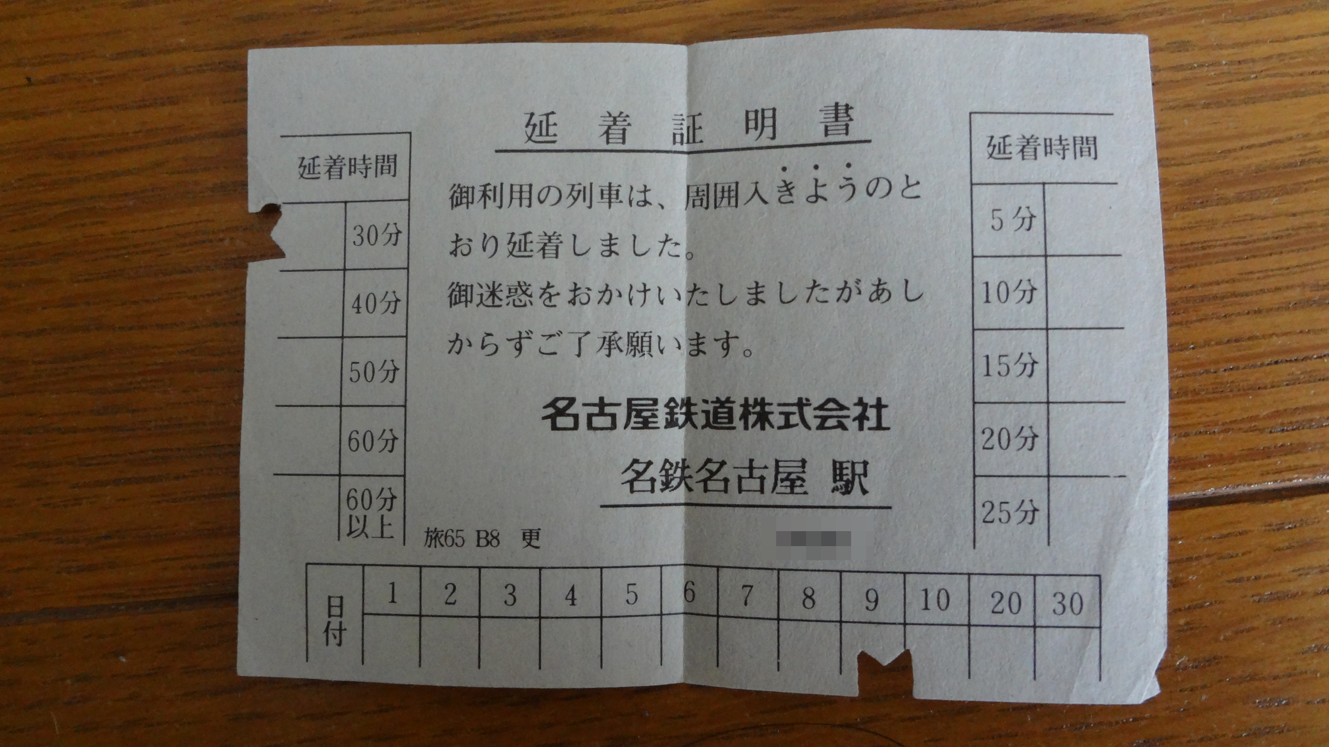 延着証明書（名鉄）